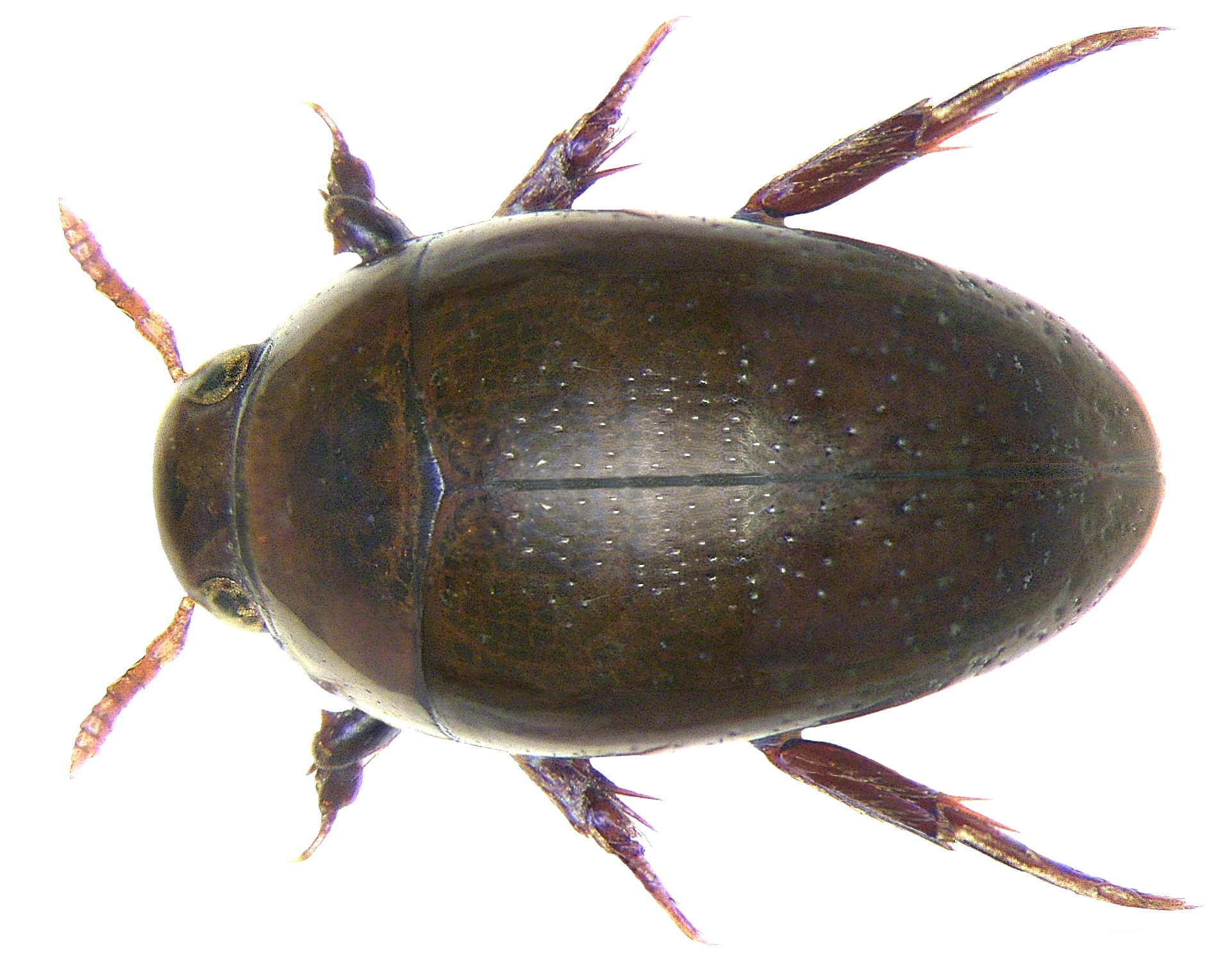 Noterus clavicornis (DeGeer, 1774) male. Familie: Noteridae Grösse: 4,2-5 mm Verbreitung: Europa Fundort: Austria, Neusiedler See leg.det. U.Schmidt, 1975 Foto: U.Schmidt, 2008